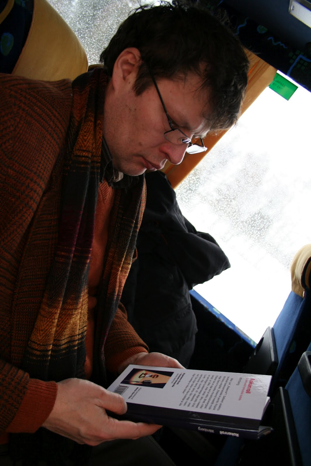 Andrei Hvostov sõitmas Kirjanike Liidu korraldatud Kulka kirjanduse sihtkapitali aastaauhinna nominendide tutvustusesinemisele Tartus.